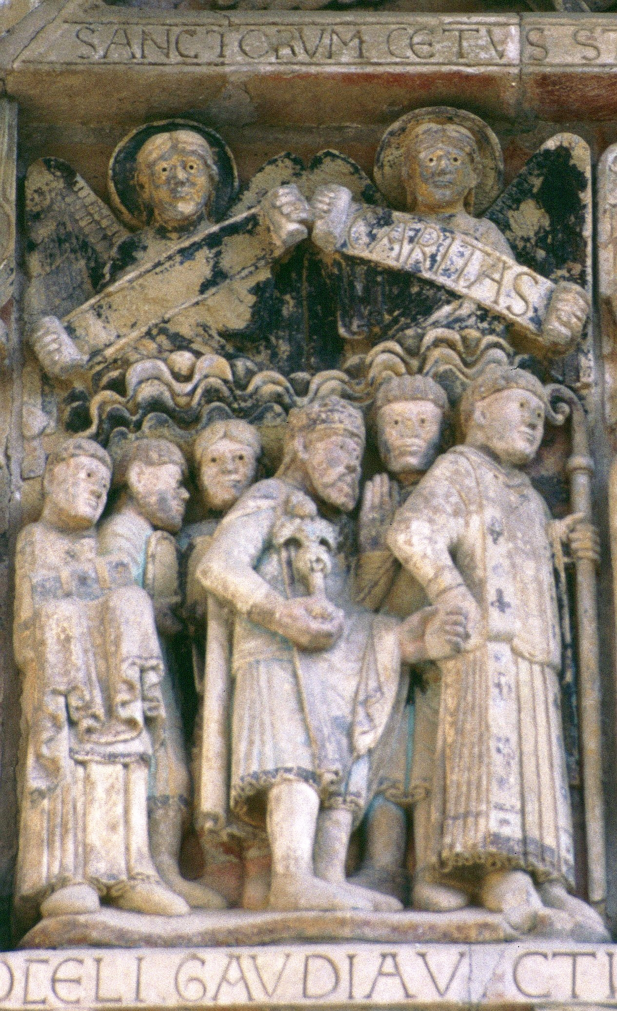 Conques: Sainte-Foi, Typanon-Detail